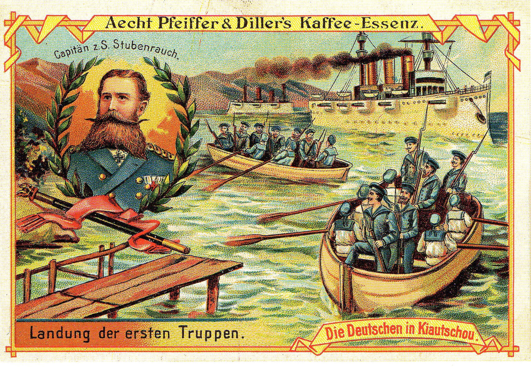 Reklamesammelbild "Die Deutschen in Kiautschou/ Kapitän zur See Stubenrauch"